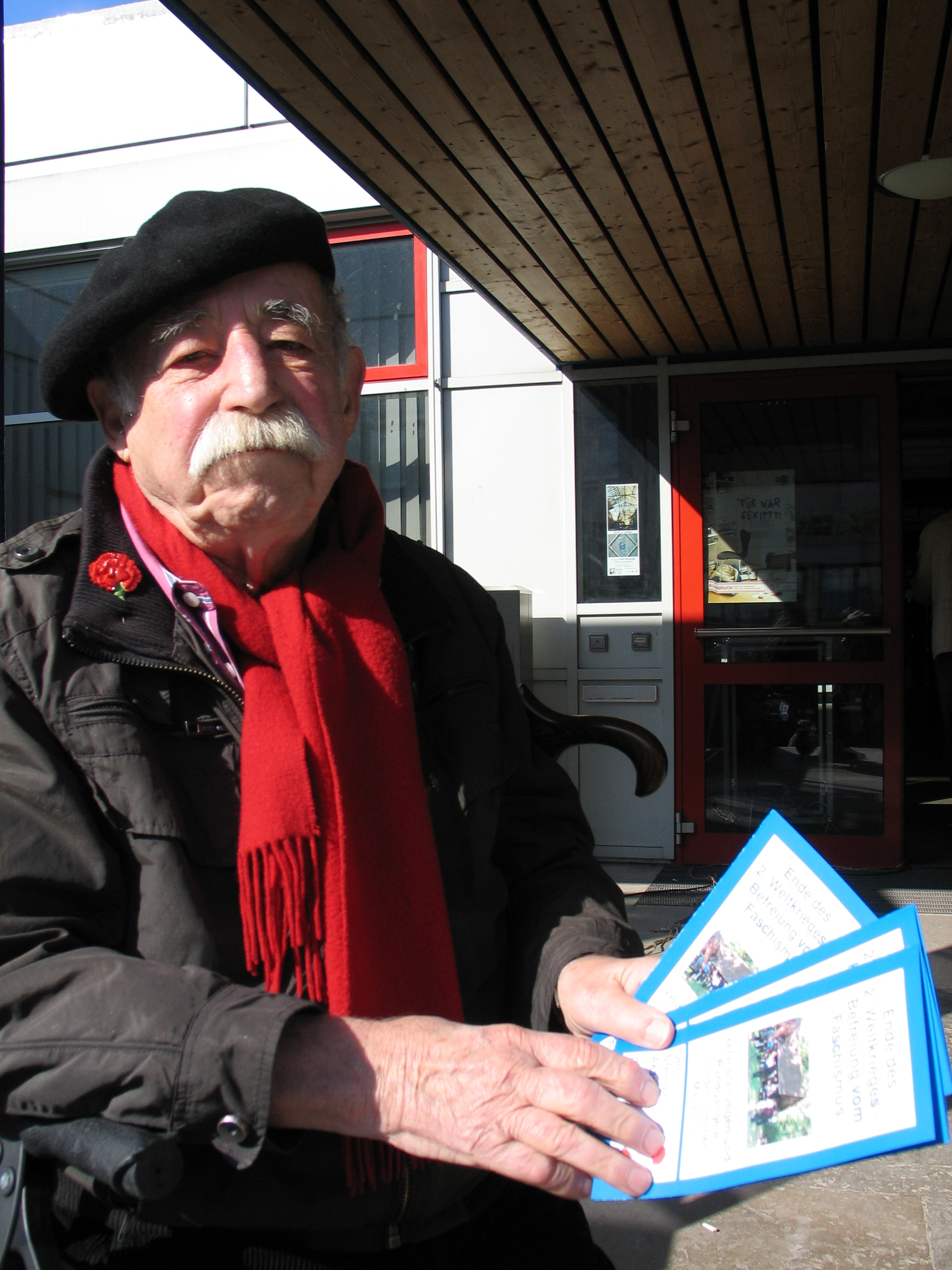 Foto mit Egon Kuhn vom 1. Mai 2013 in Hannover: Der Deutsche Gewerkschaftsbund hatte zu den Demonstrationen unter dem Motto "Gute Arbeit. Sichere Rente. Soziales Europa" aufgerufen. Vielleicht letztmals zogen Demonstranten und unterschiedlichste Gruppierungen vom Freizeitheim Linden zum Klagesmarkt, den die Stadt Hannover im Zuge der Umbaumaßnahmen von Hannover City 2020 + demnächst mit Häusern bebauen will. Auch 2013 nahmen insbesondere Familien mit Kindern an den Feierlichkeiten teil und konnten vielleicht letztmals gleichzeitig in der Grünfläche des Gartendenkmals Alter St. Nikolai Friedhof Erholung finden ...